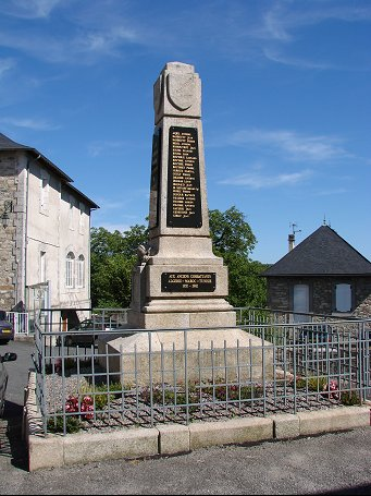 Monument aux morts de Chameyrat (Corrèze, France)